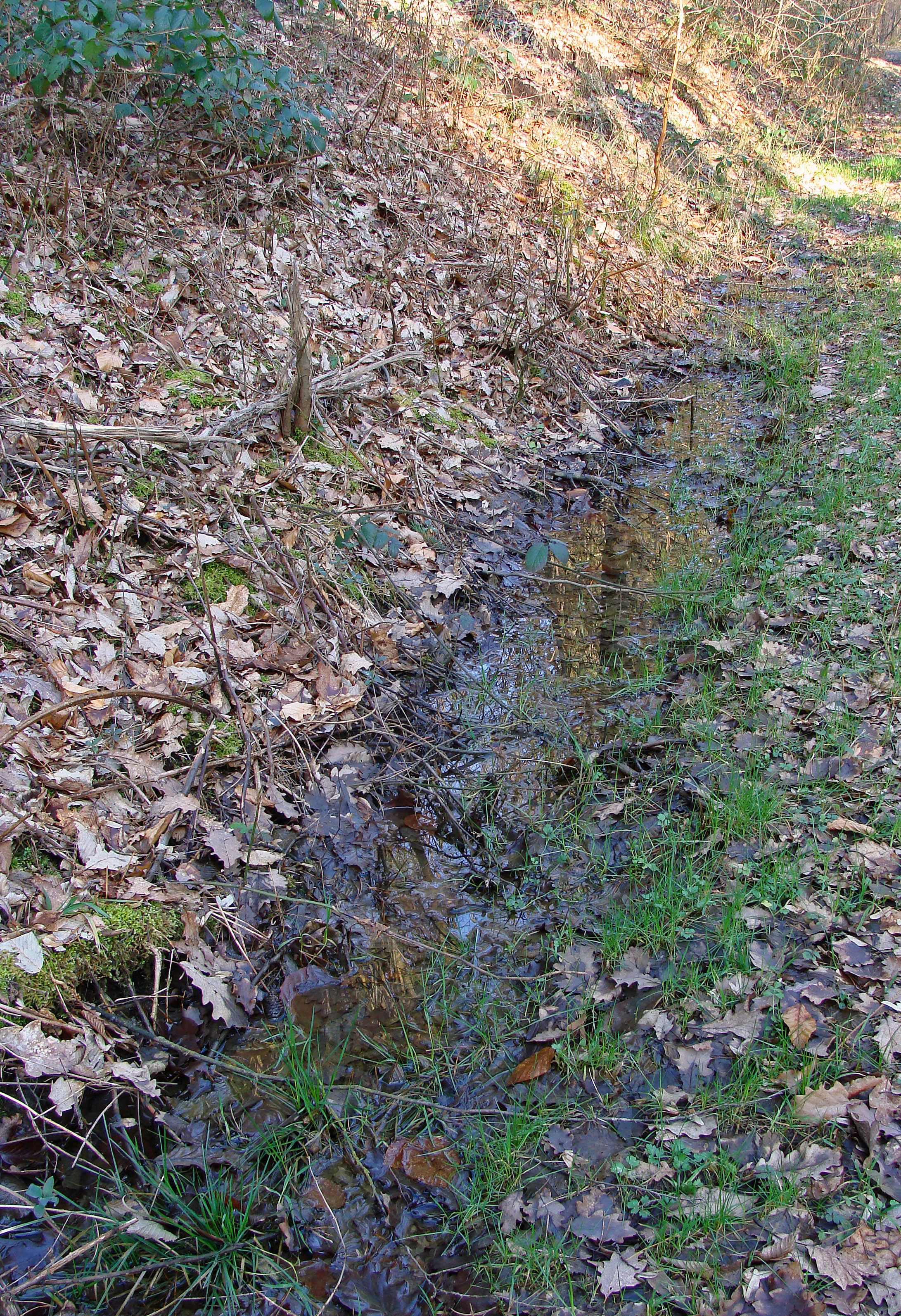 Le Doerrenbach (ruisseau) ou Dörrbach photographié dans la forêt de Karlsbrunn (Völklingen) avant la frontière à hauteur de la carrière du Barrois (Freyming-Merlebach) le 2 mars 2014.